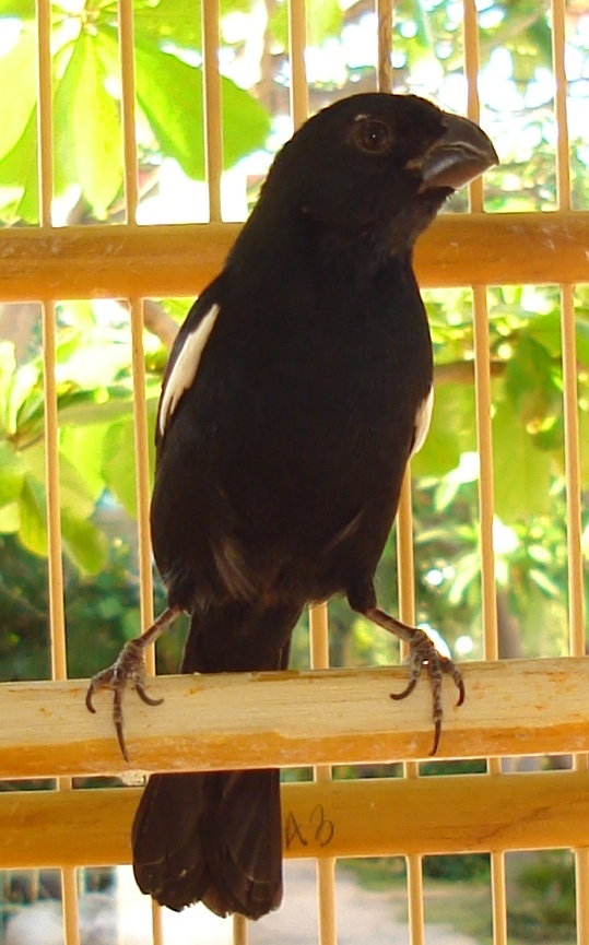 Melopyrrha nigra, Negrito, proveniente de Trinidad, Sanctis Spiritus, enjaulado, fotografiado en La Habana